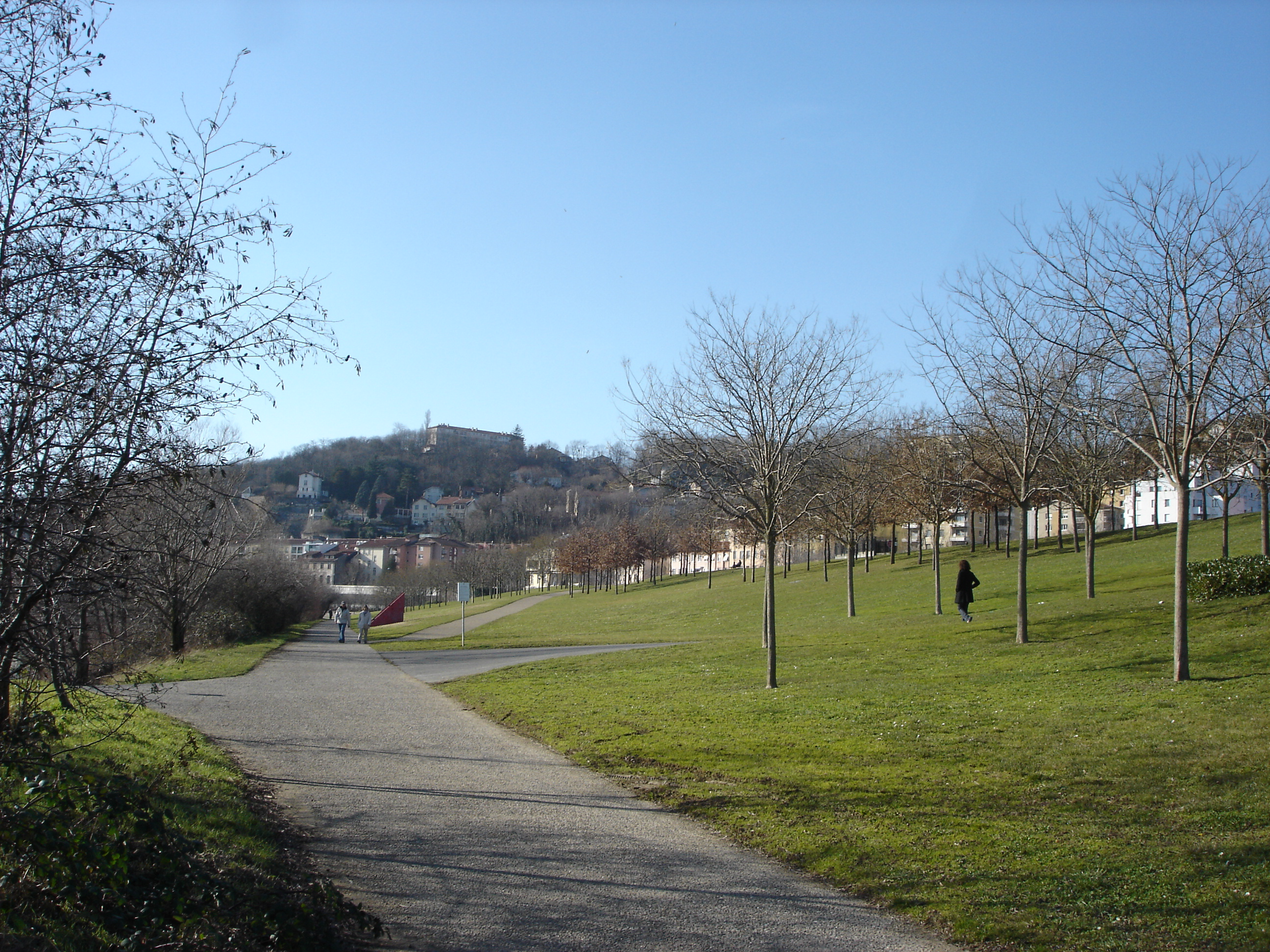 Vue, vers le nord-ouest, du parc Saint-Clair dans la commune de Caluire-et-Cuire près de Lyon.